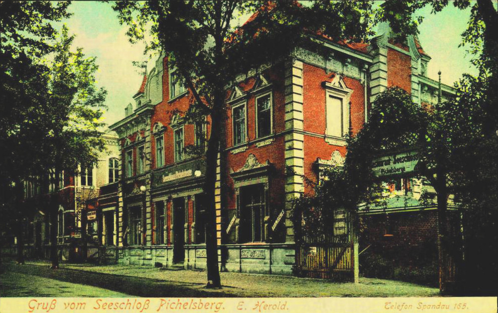 Seeschloss Pichelsberg in Berlin-Spandau am Stößensee